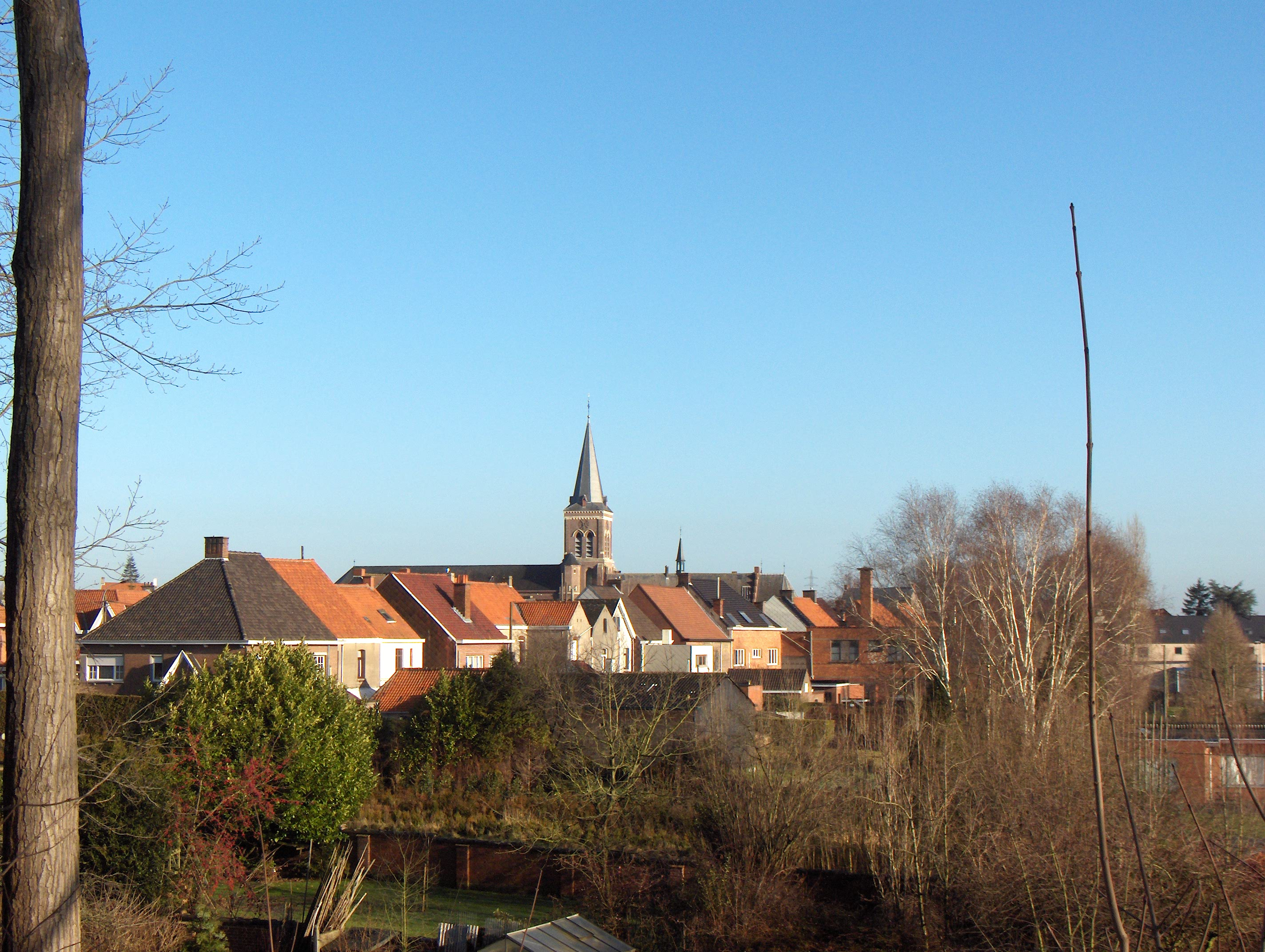 Bevere (Stadtteil von Oudenaarde, Belgien, Prov. Ostflandern), Ansicht von Westen (Straßendamm der Regionalstraße N60)